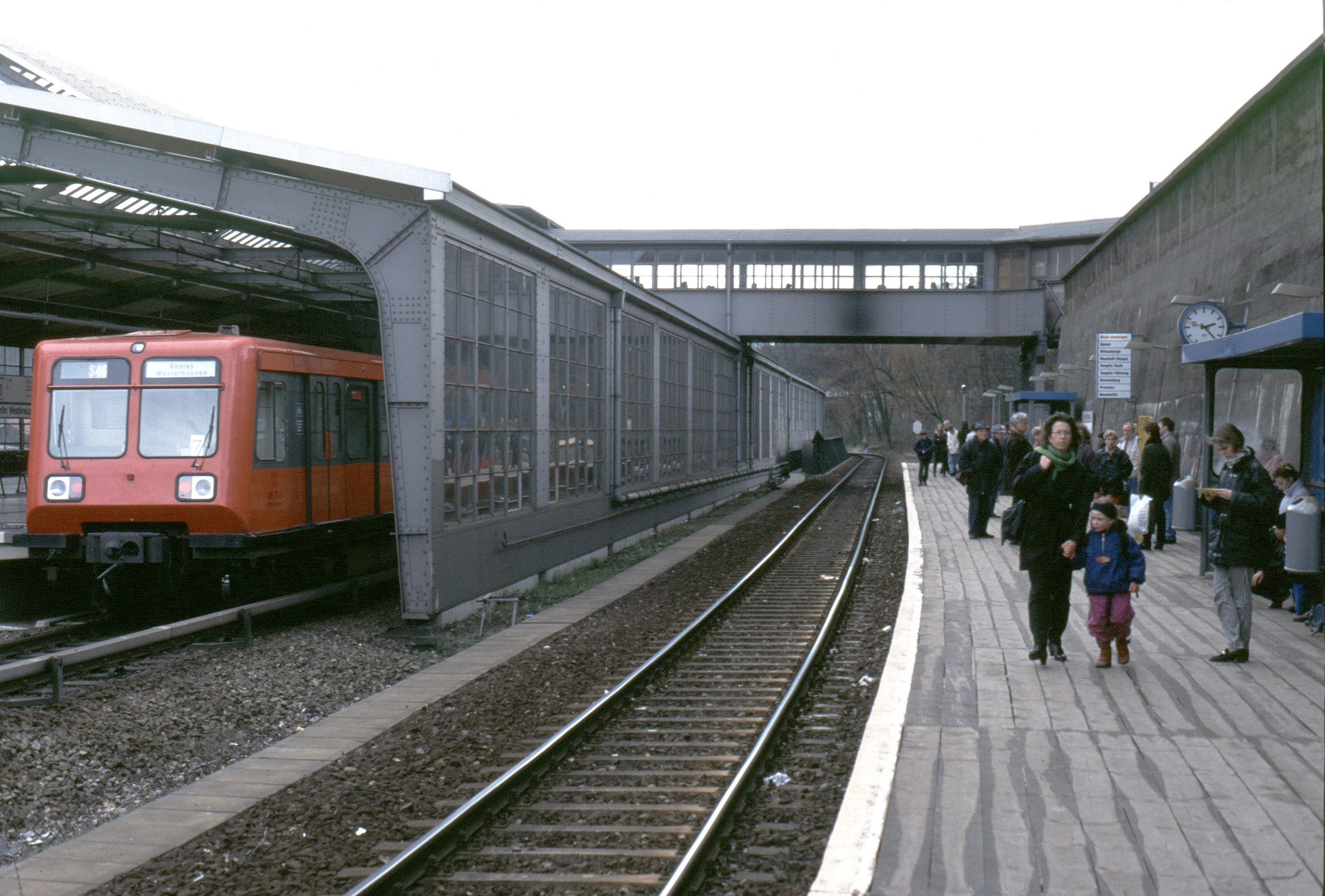 Behelfsbahnsteig Berlin Westkreuz